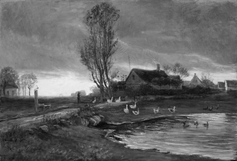 Theodor Philipsen (1840-1920), Et gadekaer. Maglebylille, 1903